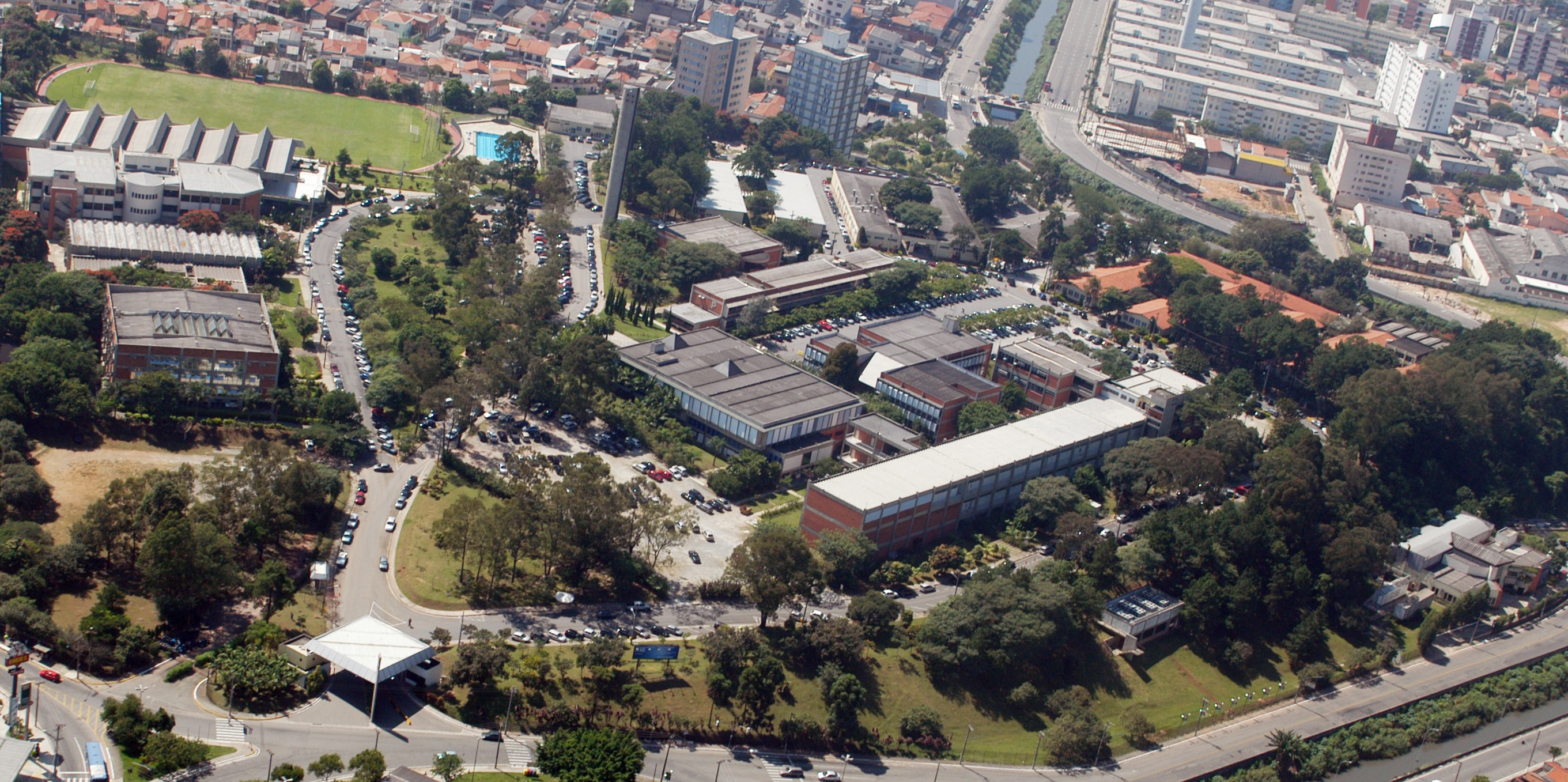 Fotoa aérea do Campus de São Caetano do Sul do Instituto Mauá de Tecnologia